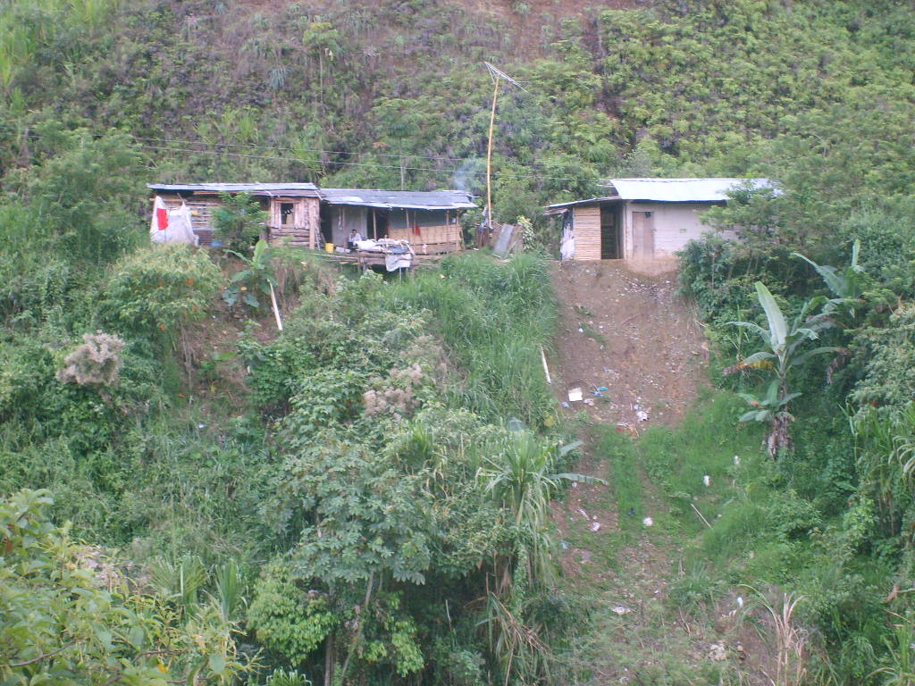 Casa aledaña ala ribera del rio Ovejas